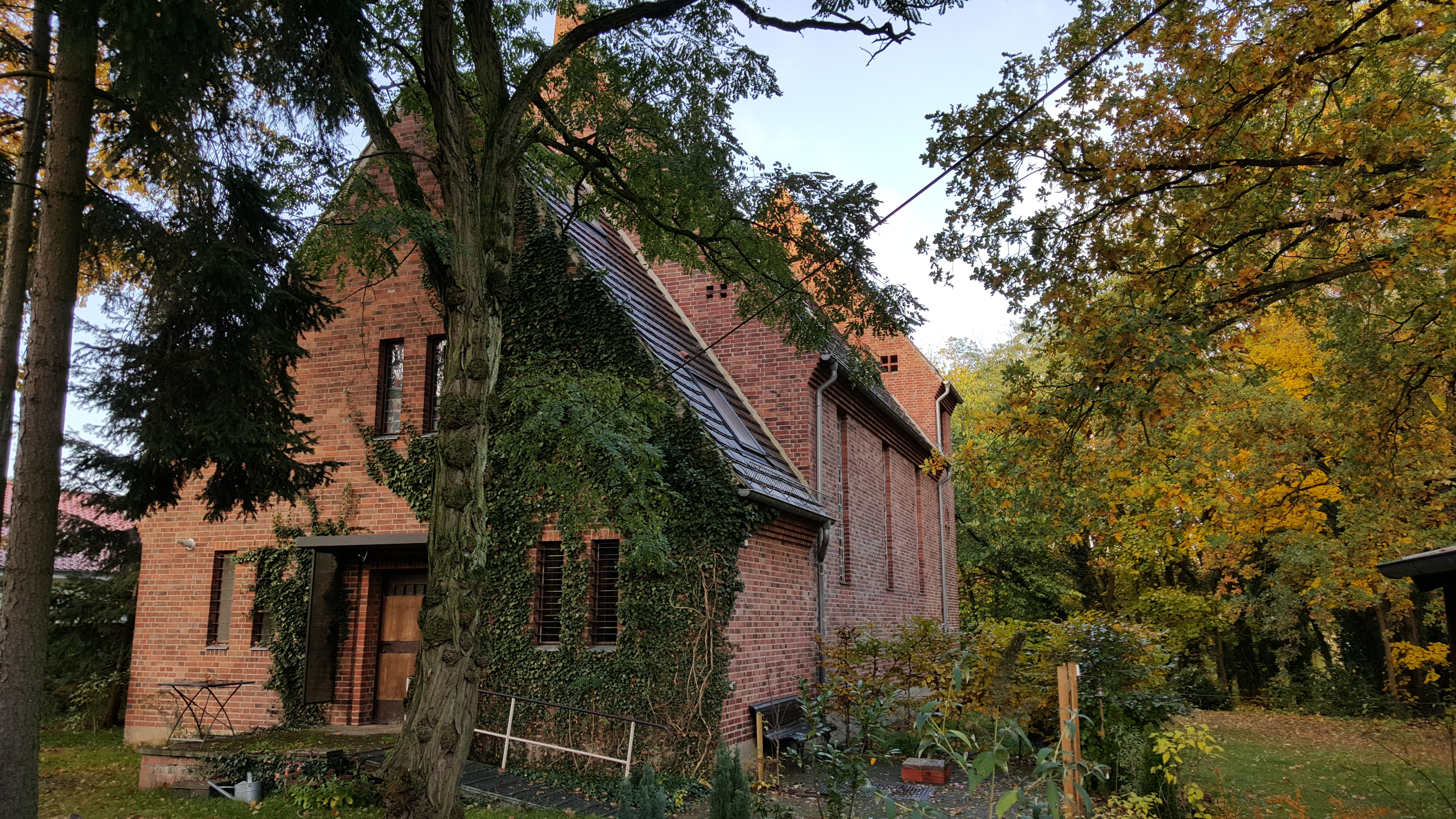 Klause Herbst 2015